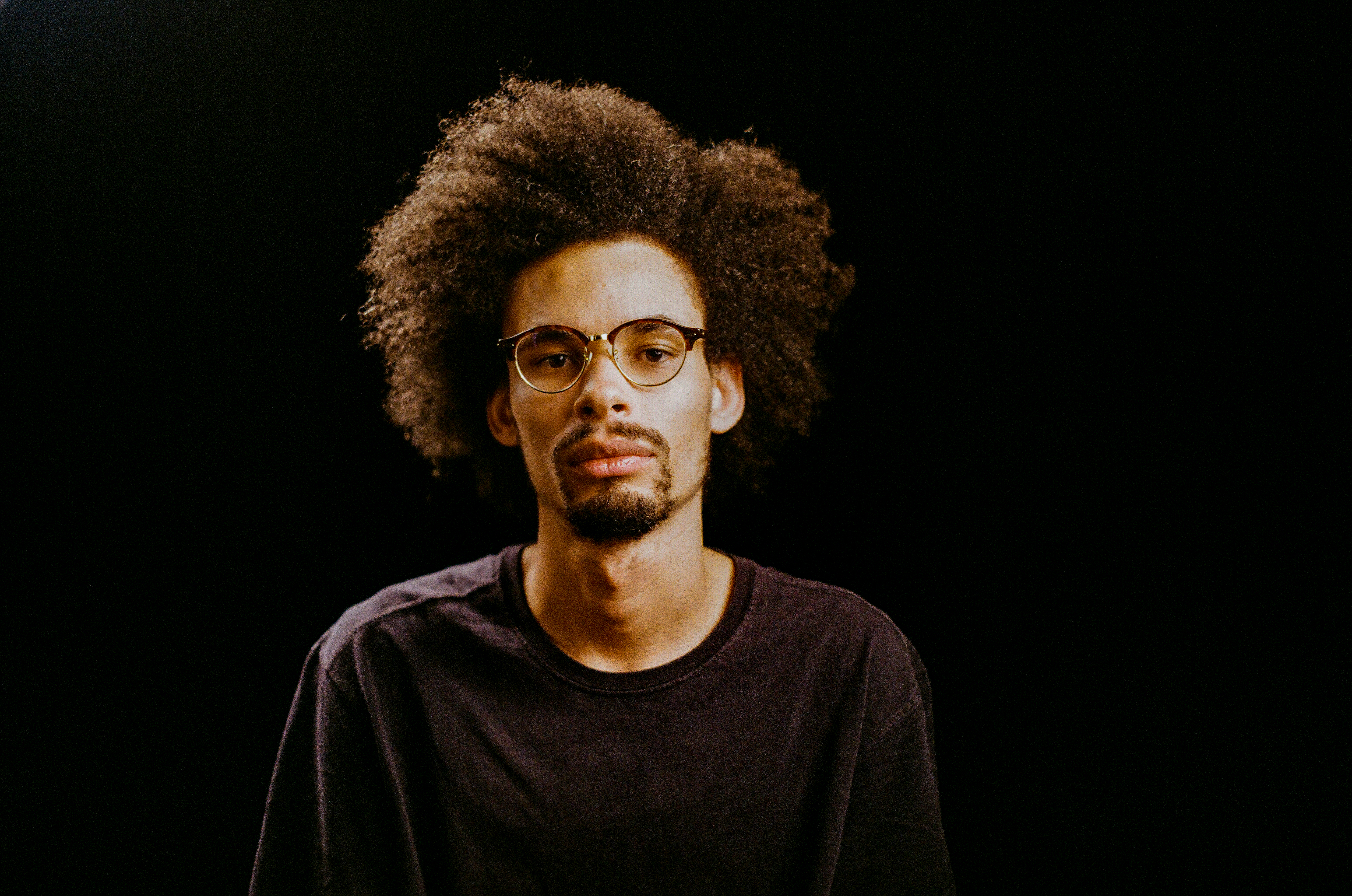 Vinícius Silva, estúdio, Caio Mazzilli, 2020.